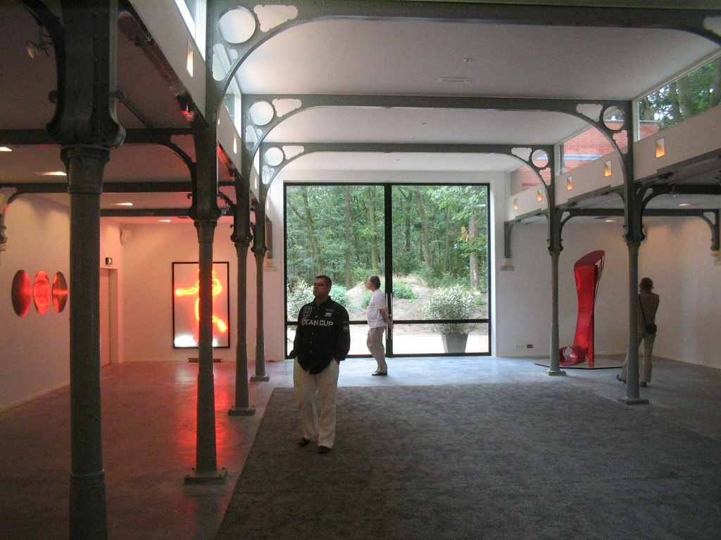 foto van ruimte in Hilvaria Studio's.